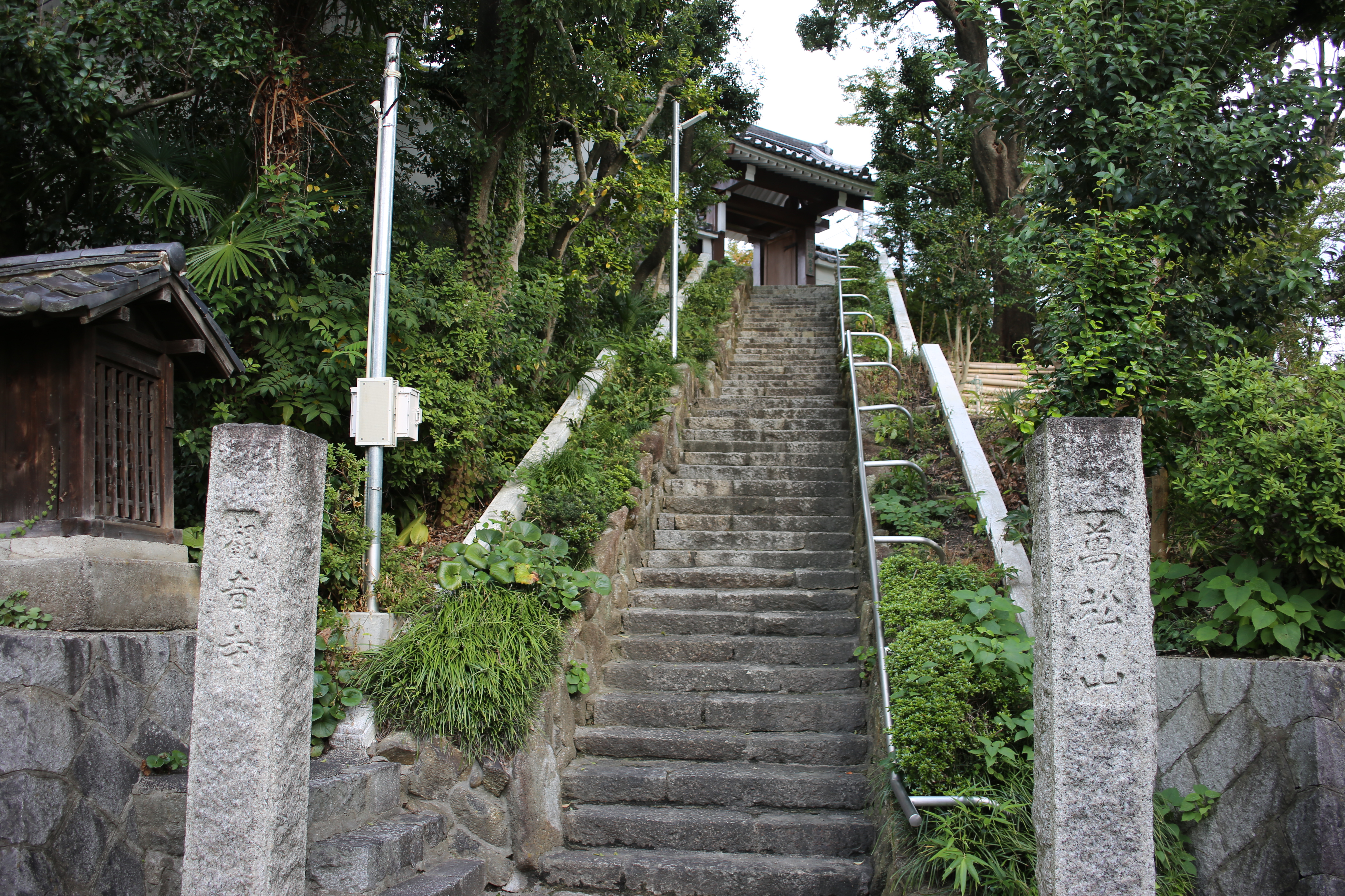 名古屋市名東区上社三丁目の萬松山観音寺を西側公道より撮影